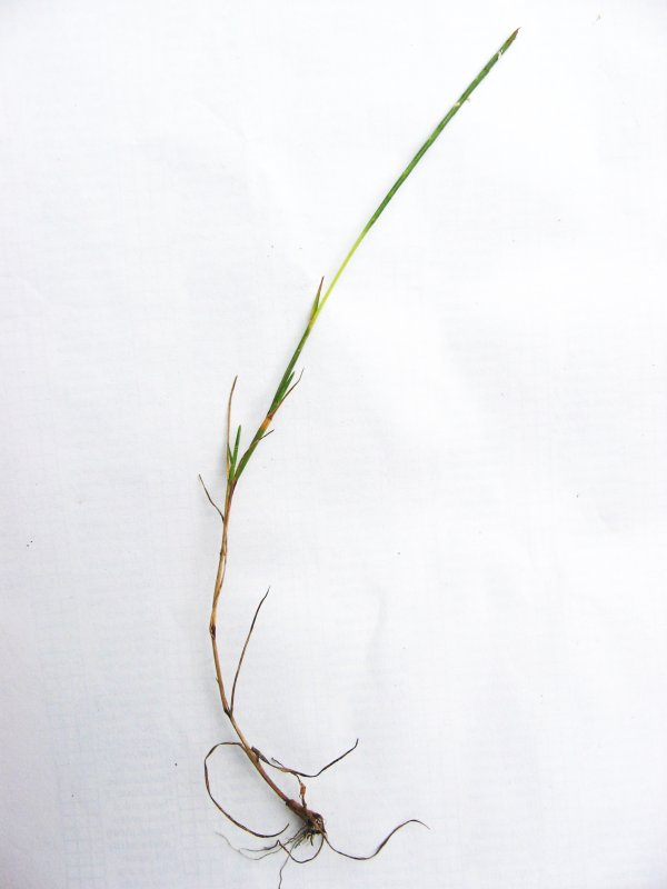 Gekrümmter Dünnschwanz Parapholis strigosa, Wismarbucht